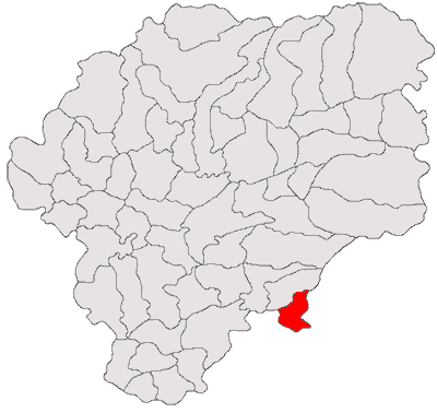 Categorie:Hărţi ale judeţului Bistriţa-Năsăud